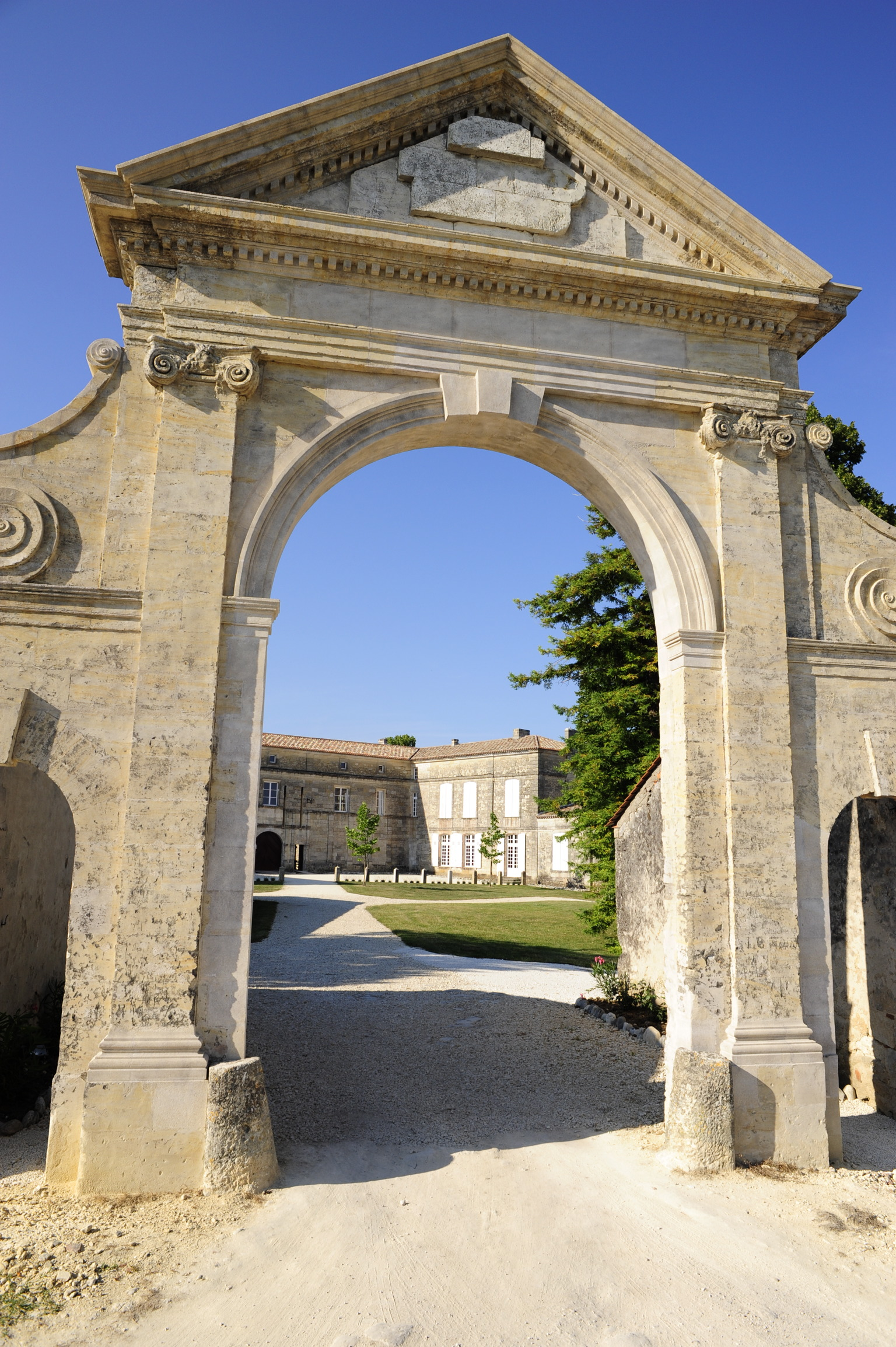 Le proche du château de Francs à Francs